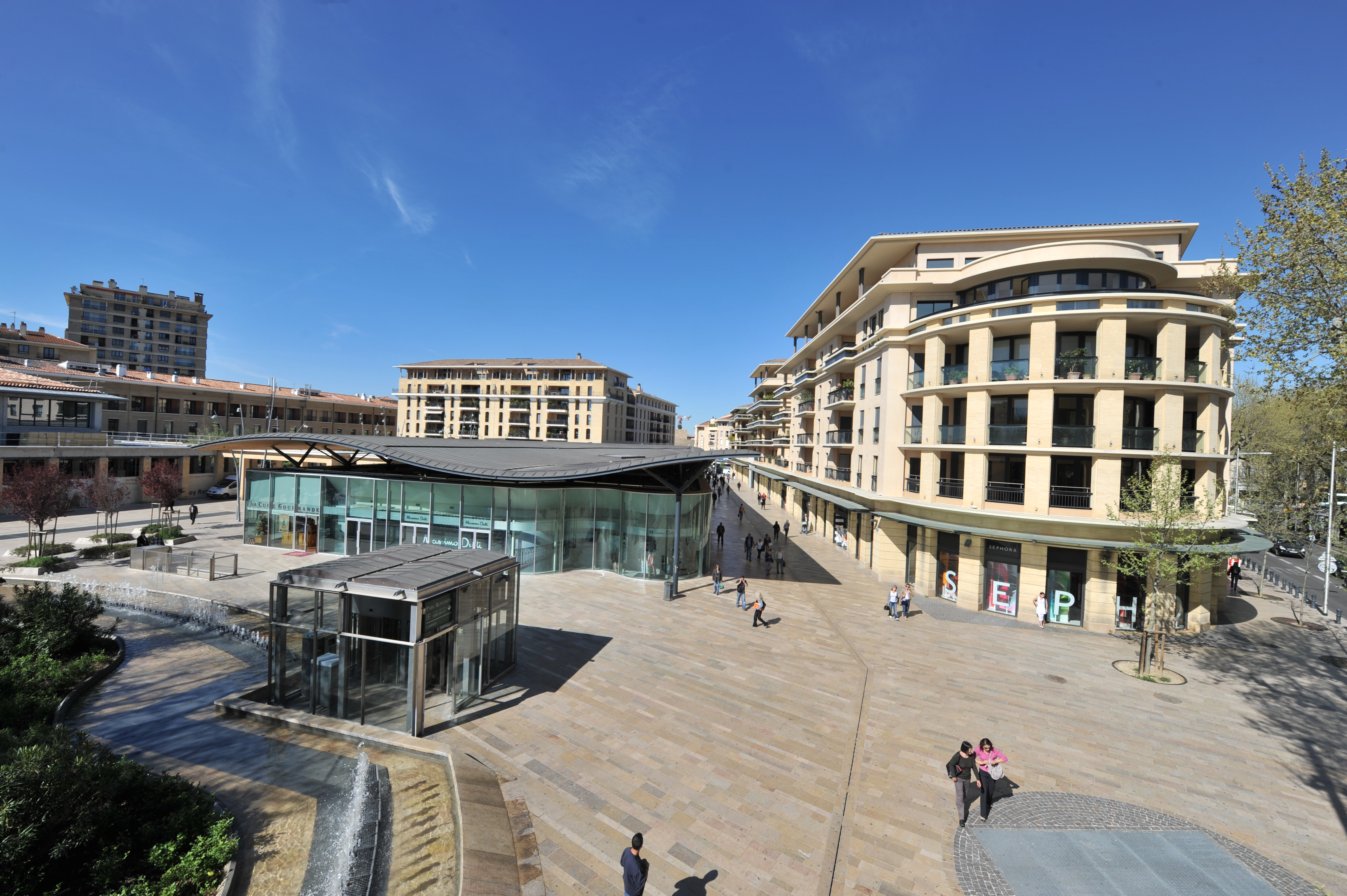 Vue de la place François Villon et des Allées provençales d'Aix-en-Provence (France)